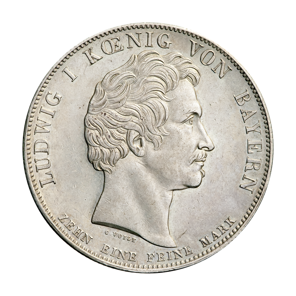 Бавария, королевство. Король Людвиг I (1825—1848). Талер 1833 г. Памятник баварским воинам, погибшим в России. Памятная монета. Серебро. Проба 833. Вес 28,07 г. Диаметр 38,2 мм. Гурт рубчатый.